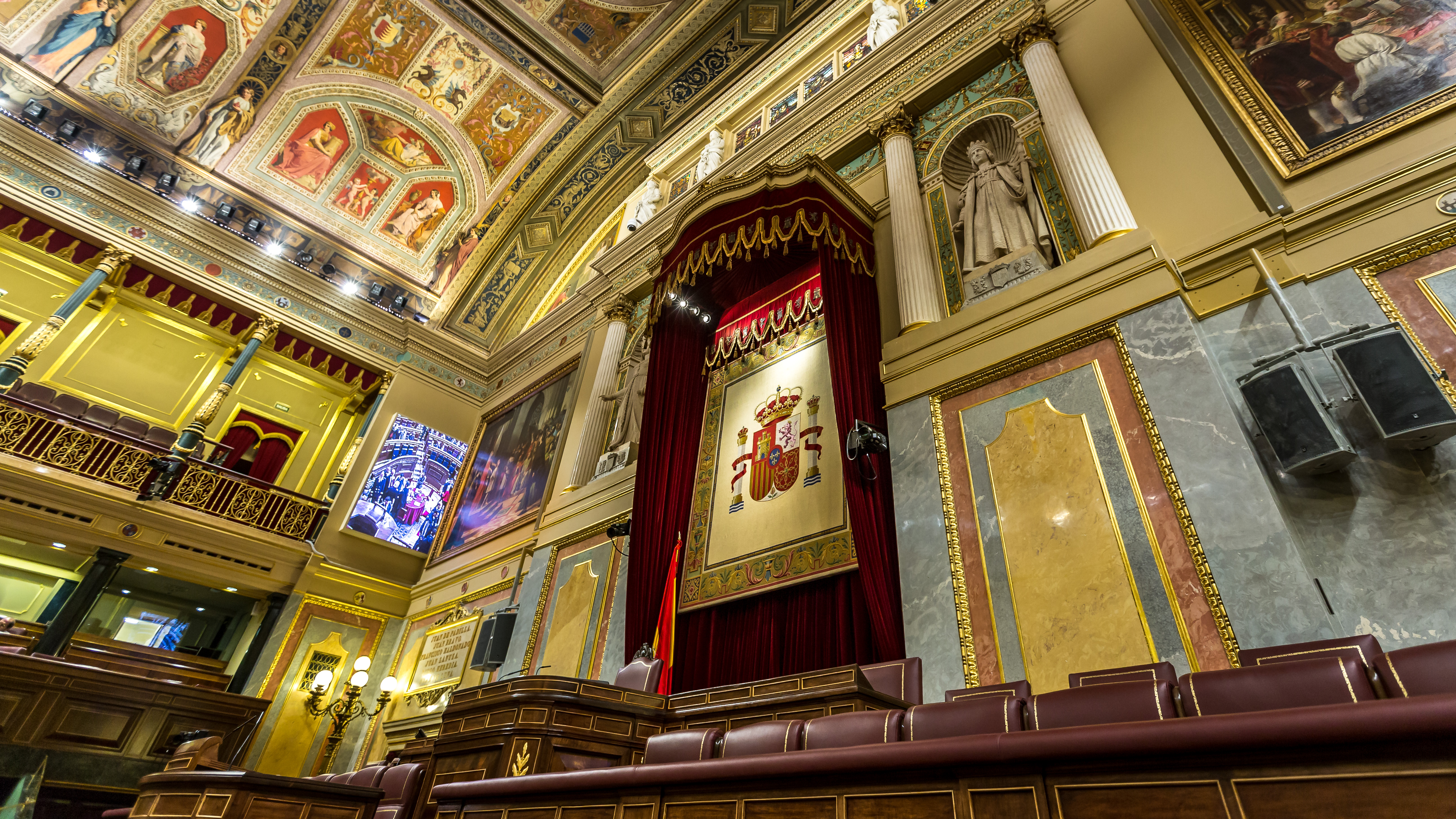 Hemiciclo del Congreso de los Diputados, Madrid.